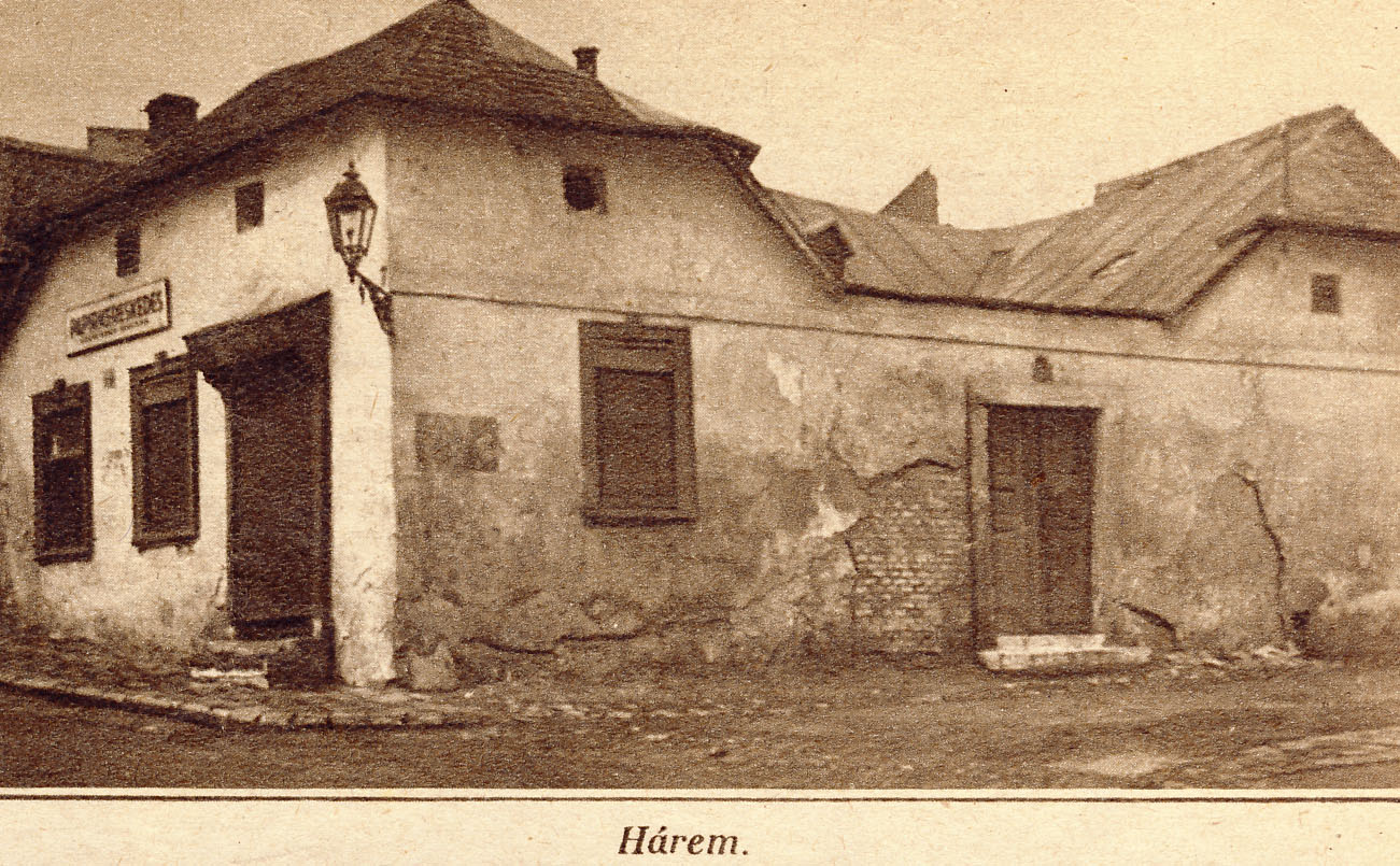 Budapest, Tabán, a Hárem.